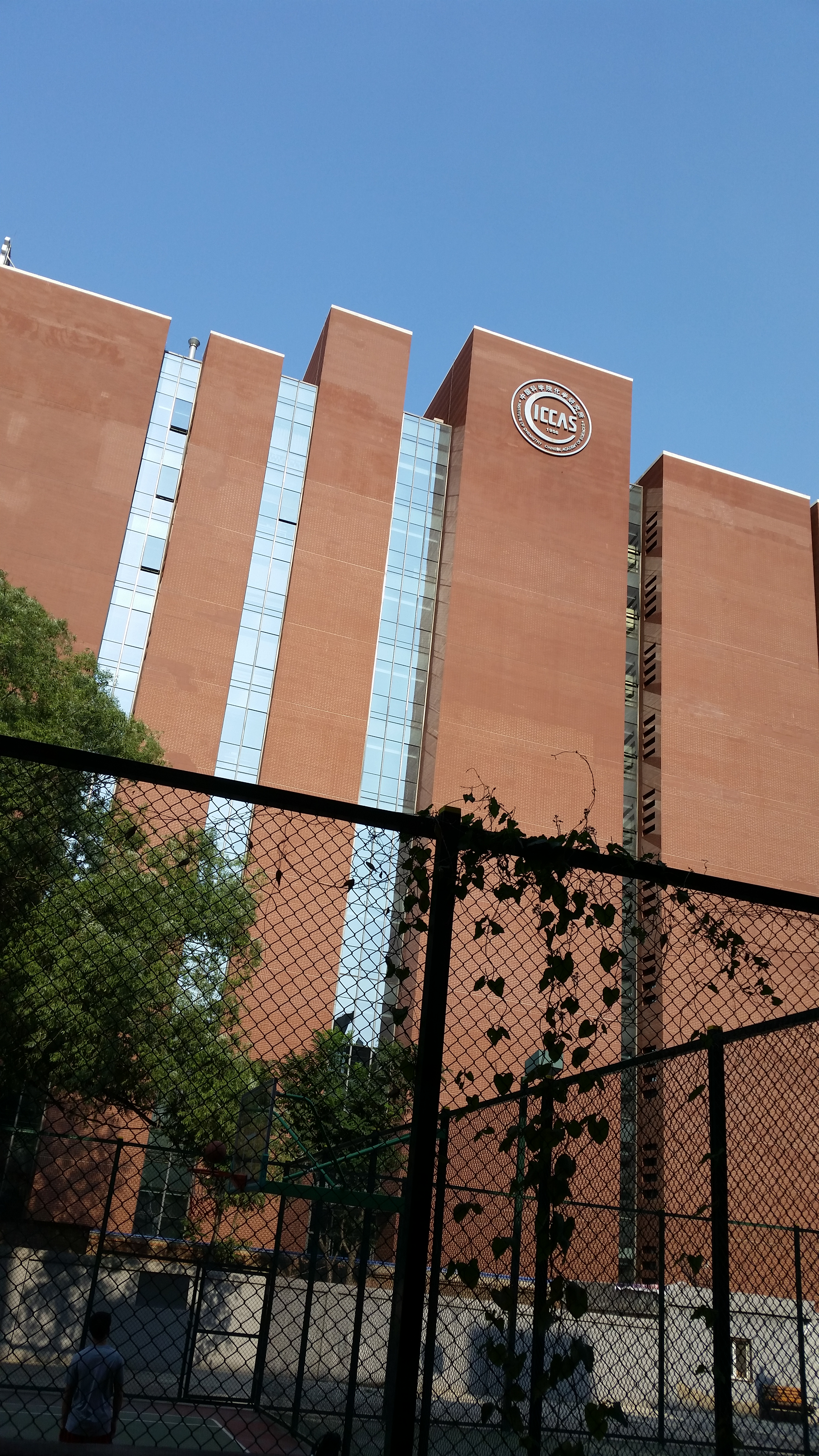 中科院化学所